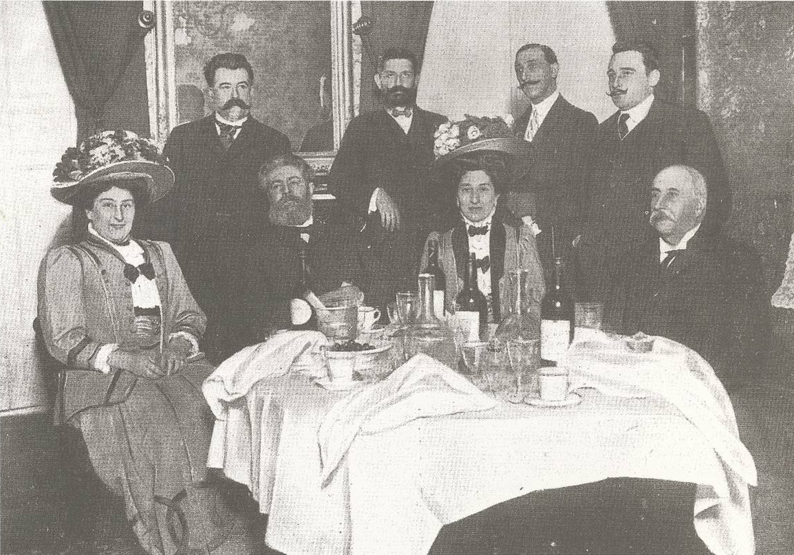 Joaquín Costa con Miguel Morayta, Manuel Bescós, el doctor Calzada, la familia de este y otros amigos publicada en origen en la revista Nuevo Mundo, nº893, 16 de febrero de 1911, p. 17.